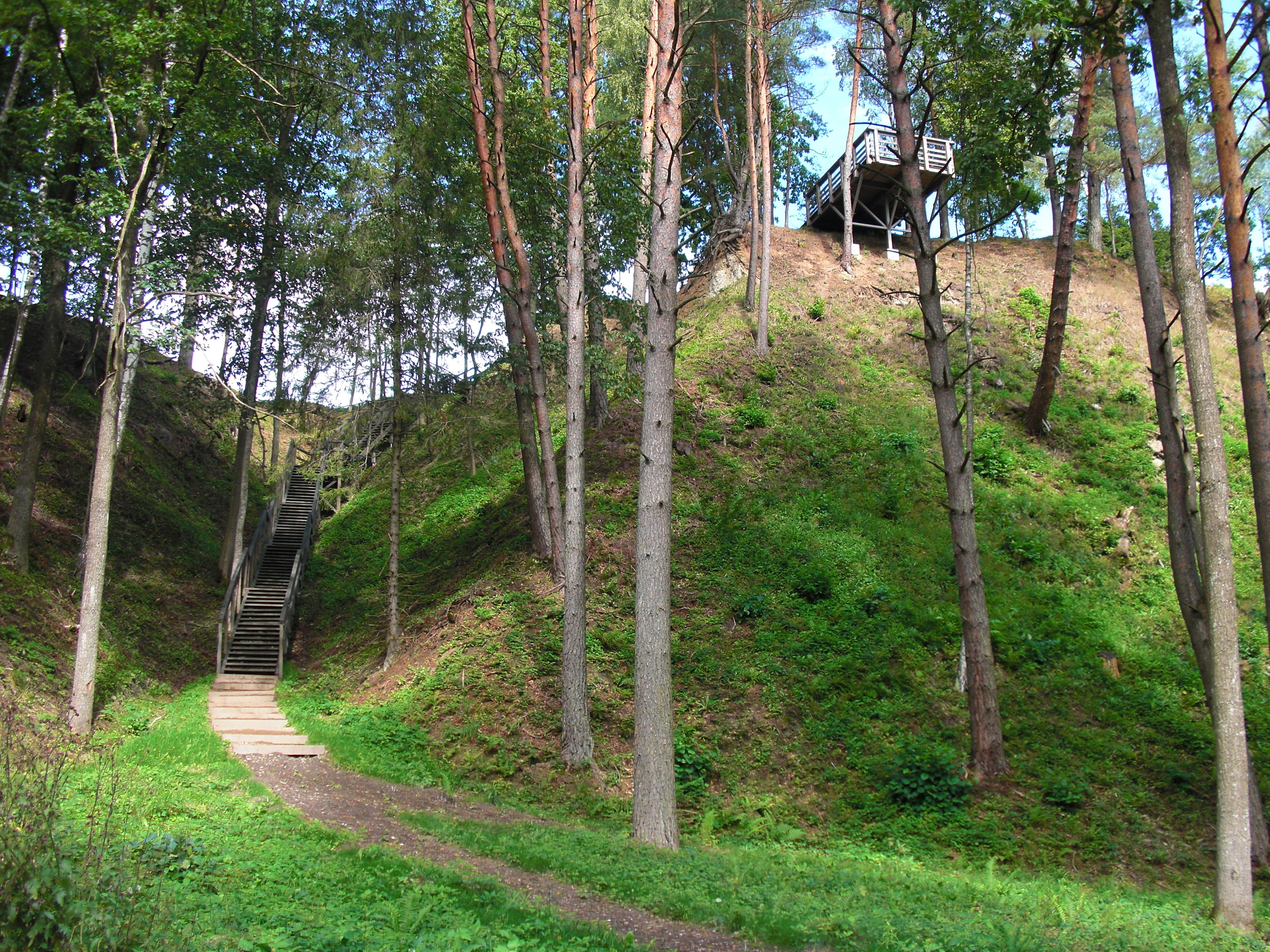 Daumantų atodanga